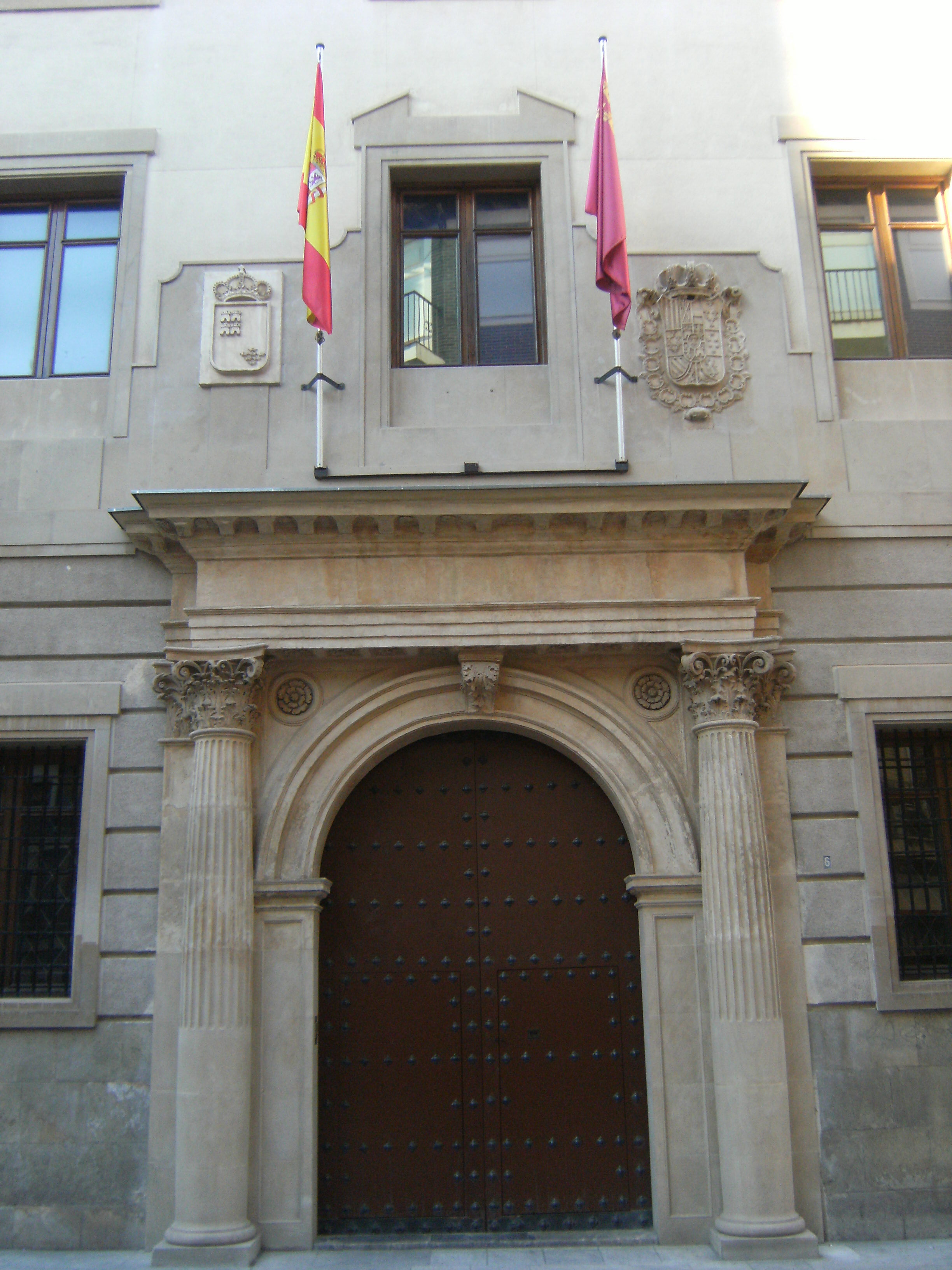 Puerta renacentista del Palacio de San Esteban (Murcia). Siglo XVI